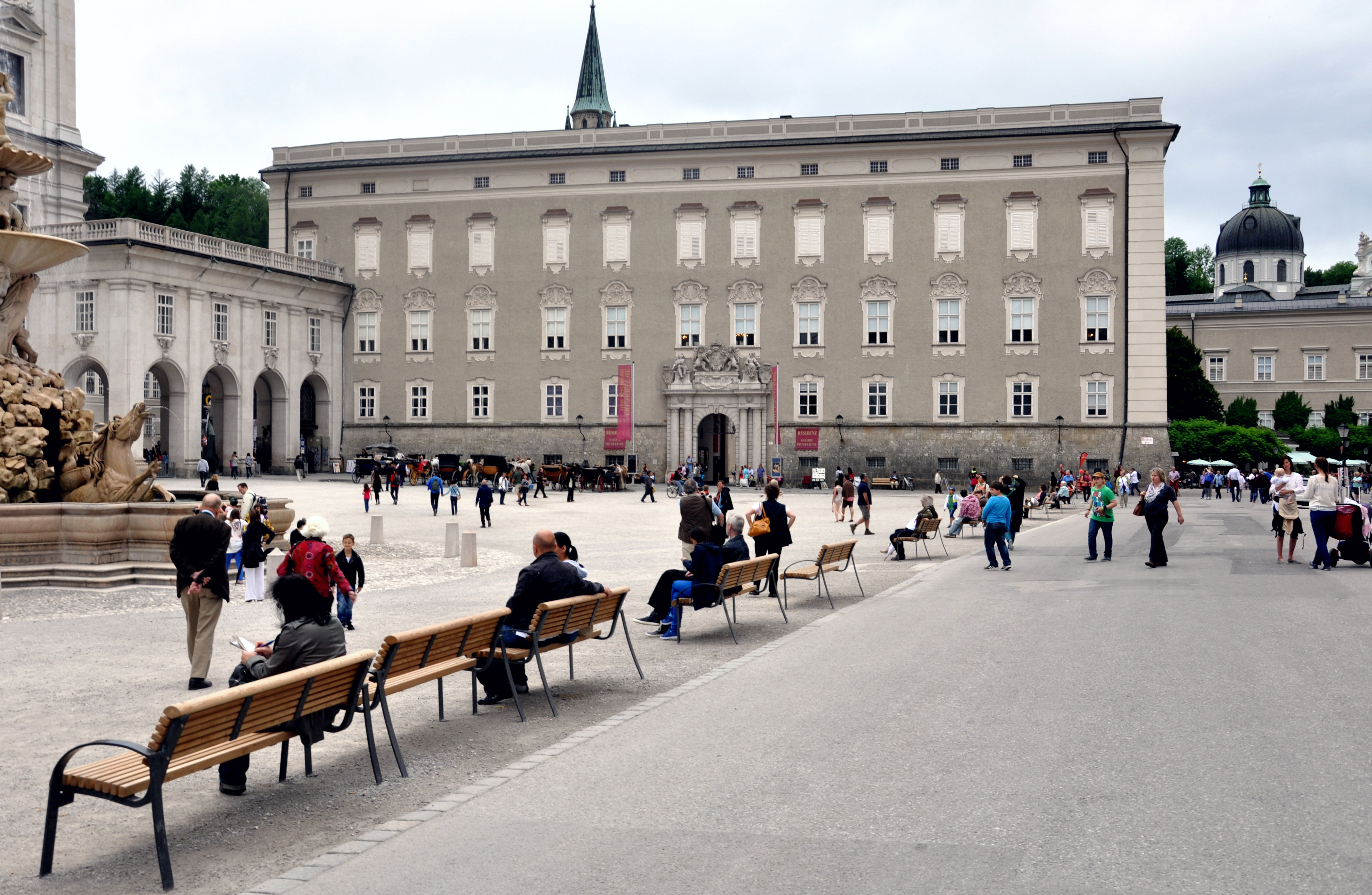 Salzburg, Residenz (Residenzplatz)